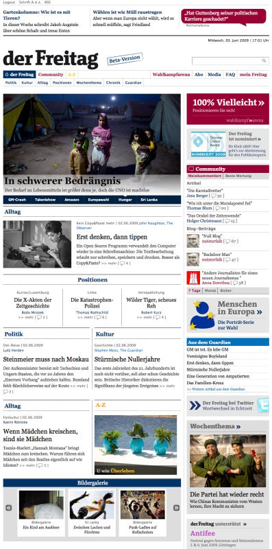 Screenshot von